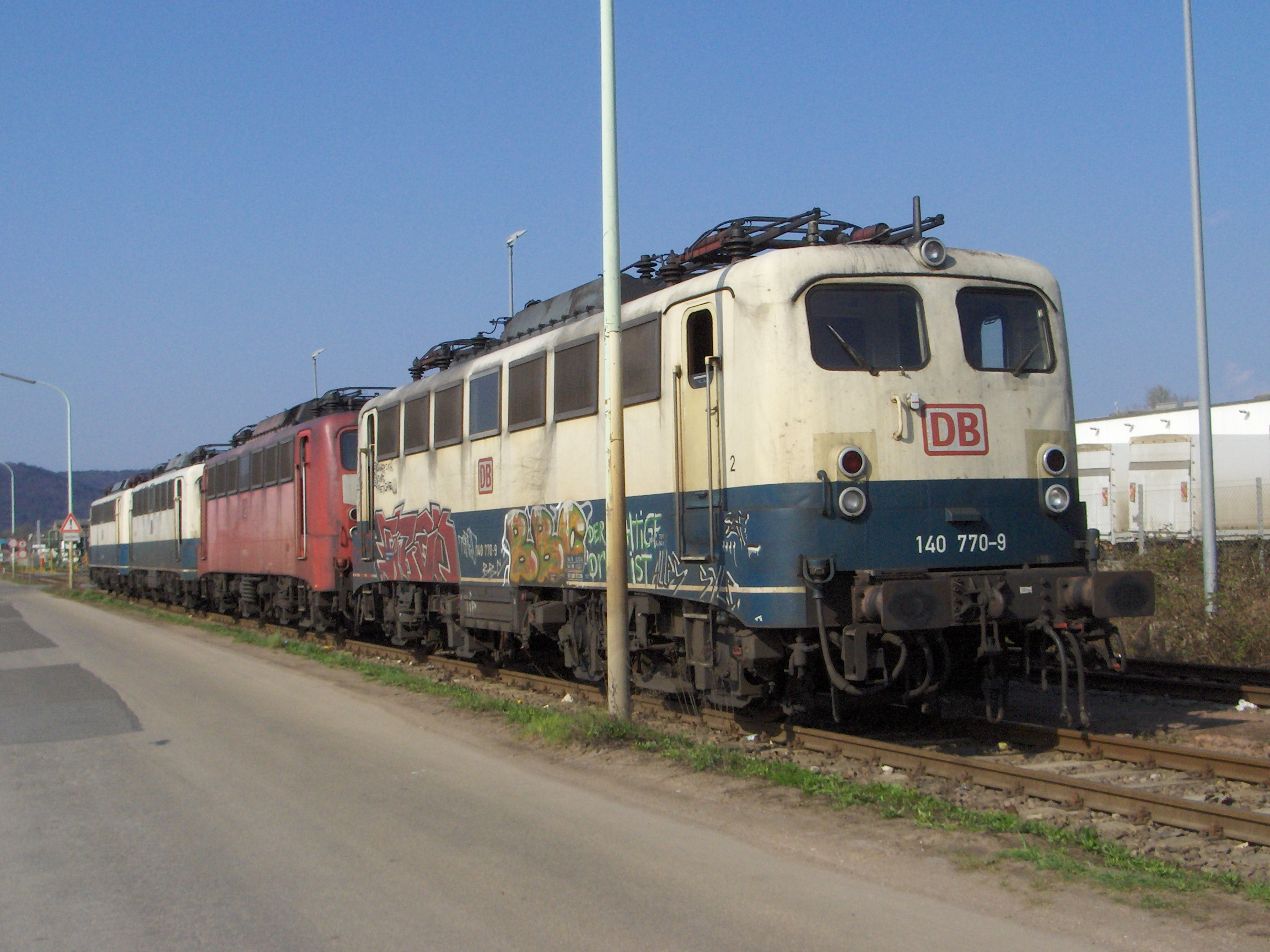 Die ehemaligen DB-Güterzuglokomotiven 140770, 140795, 140619 und 140705 vor ihrer Verschrottung beim Schrottverwerter Steil in Trier-Ehrang am 3. April 2005.